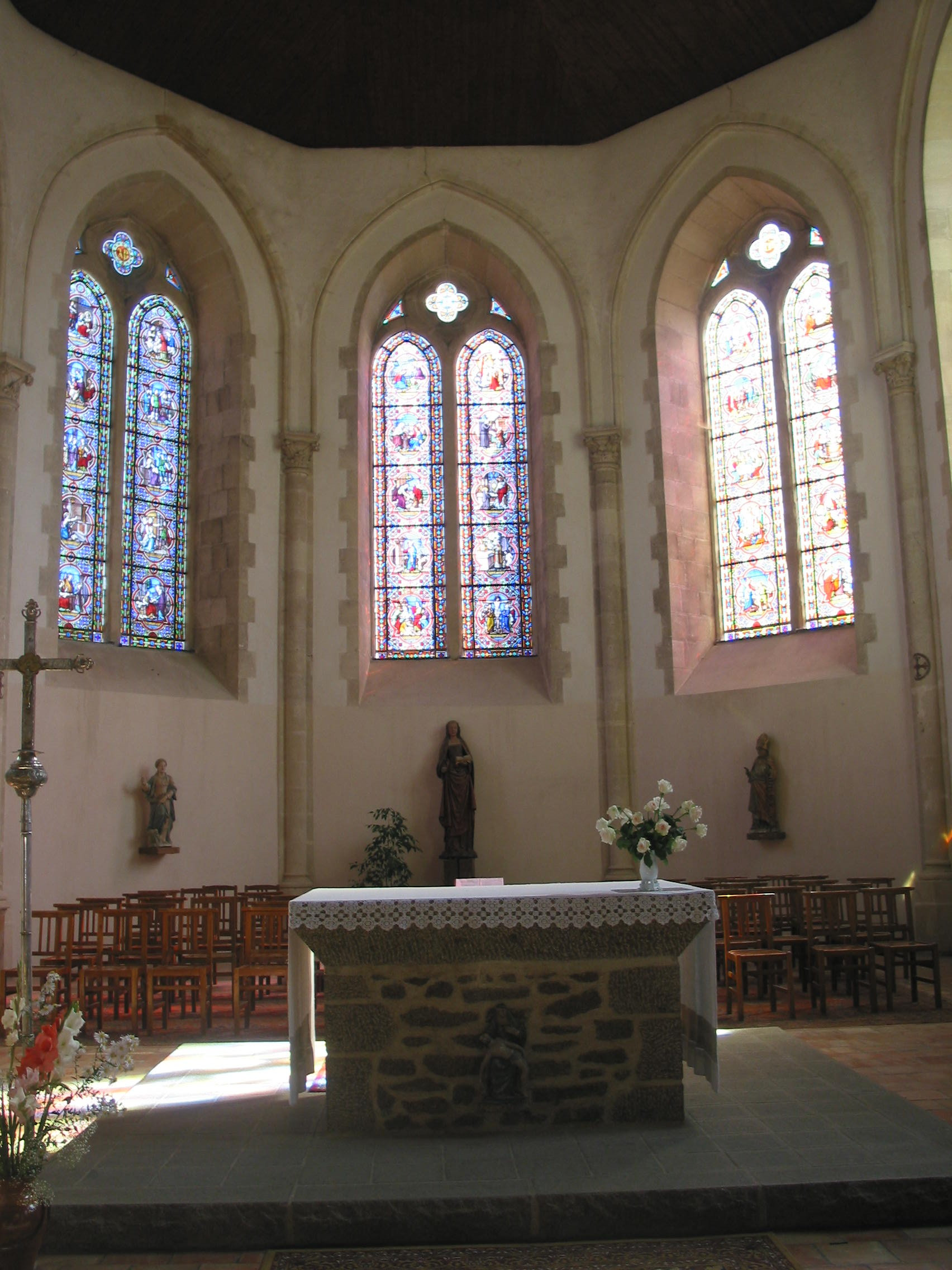 choeur et vitraux église de Sainte-Suzanne (Mayenne)